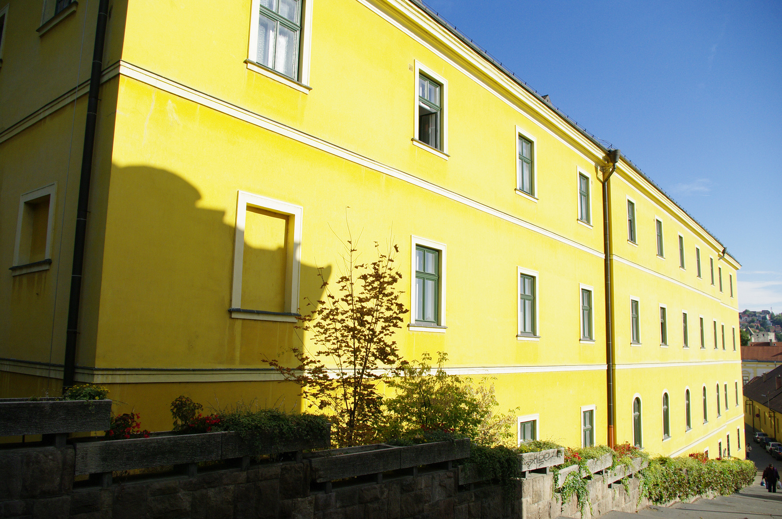 Papnevelde (Egri Érseki Hittudományi Főiskola) (Eger, Várpsfal u.) This is a photo of a monument in Hungary, Identifier: 5505